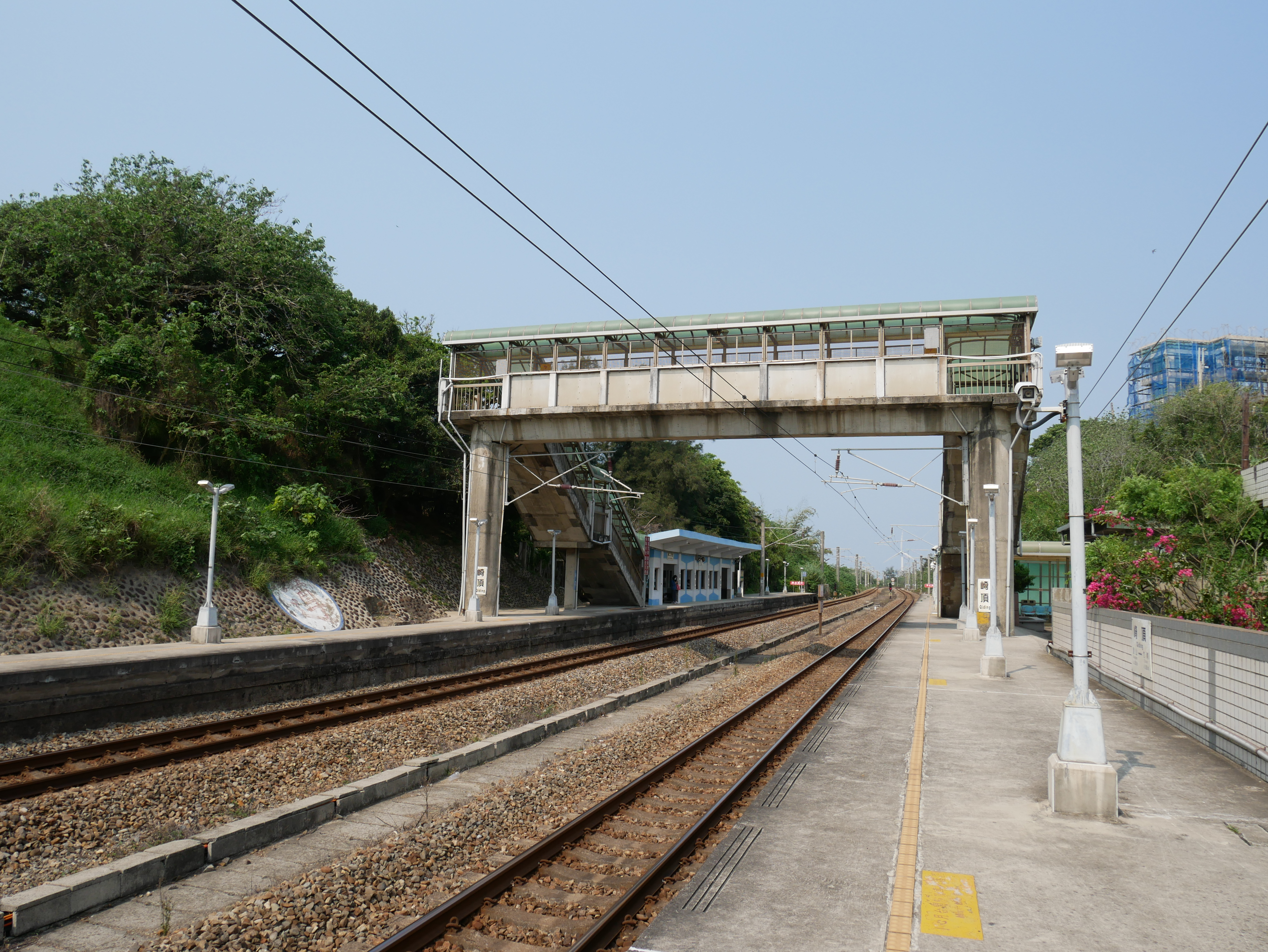 臺鐵崎頂車站月臺，苗栗縣竹南鎮崎頂里